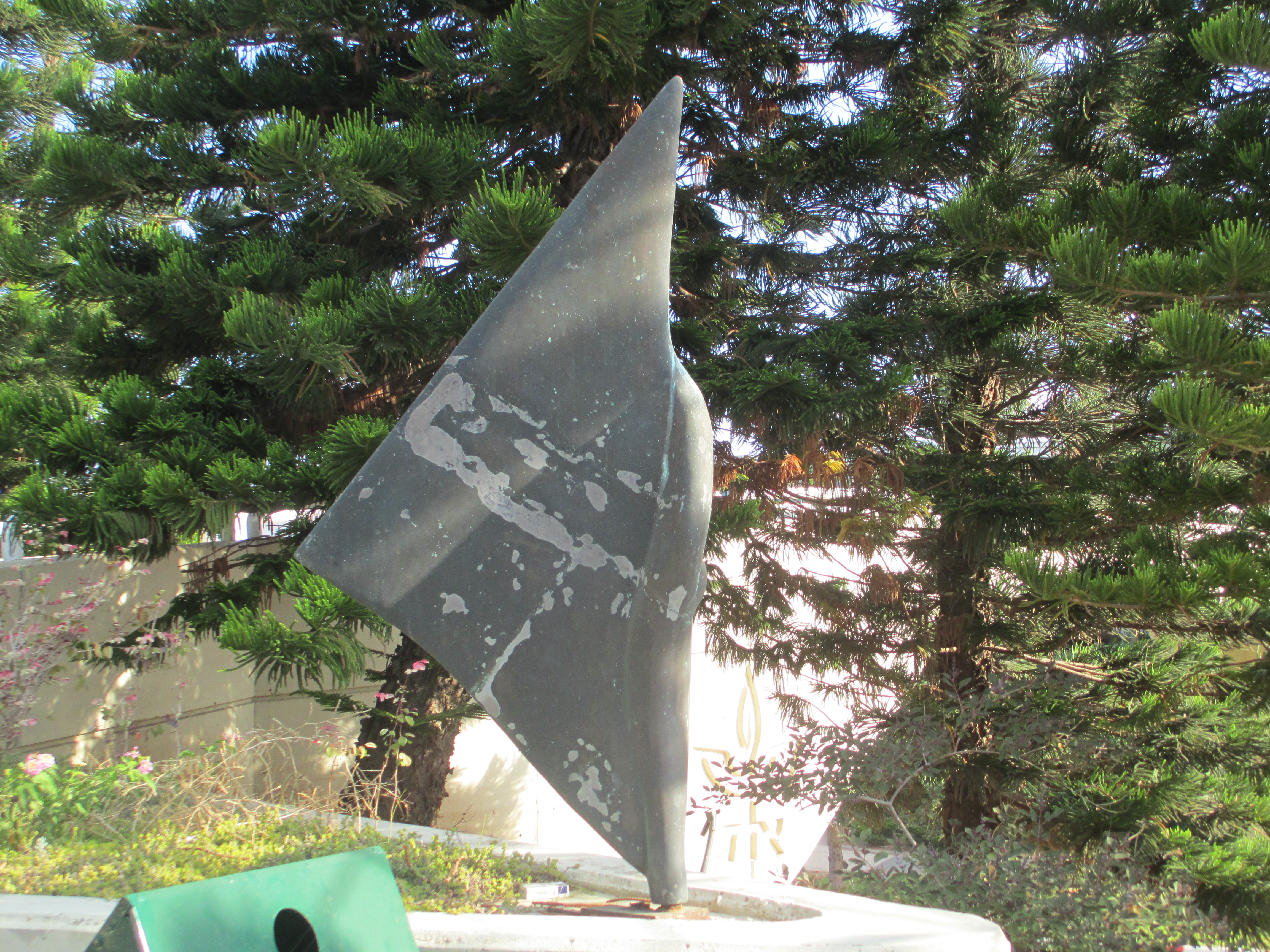 פסל של נעמי בלייק "אדם כנגד הסיכויים" באוניברסיטת תל אביב